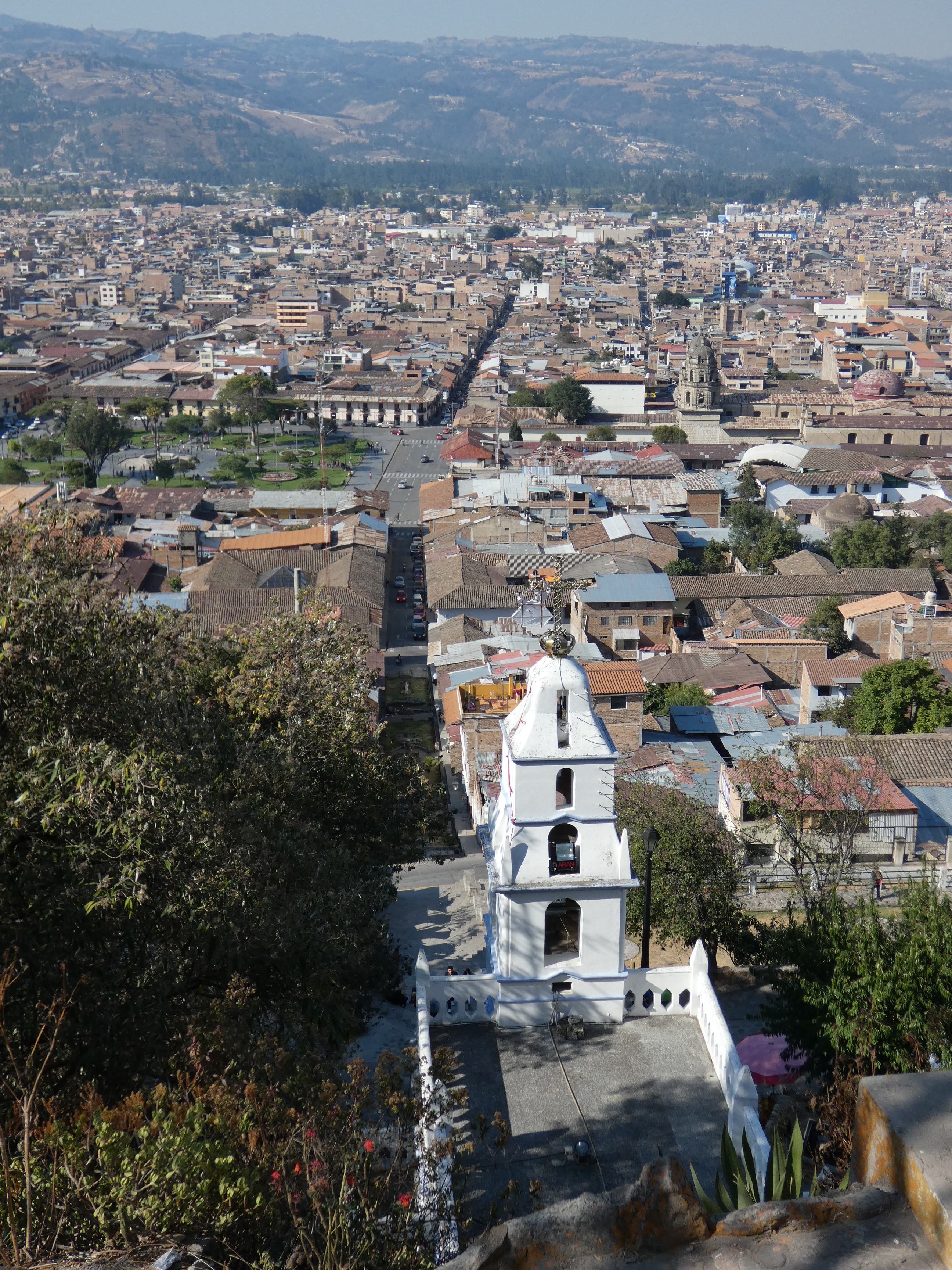 Vista del Cerro de Santa Apolonia, Cajamarca